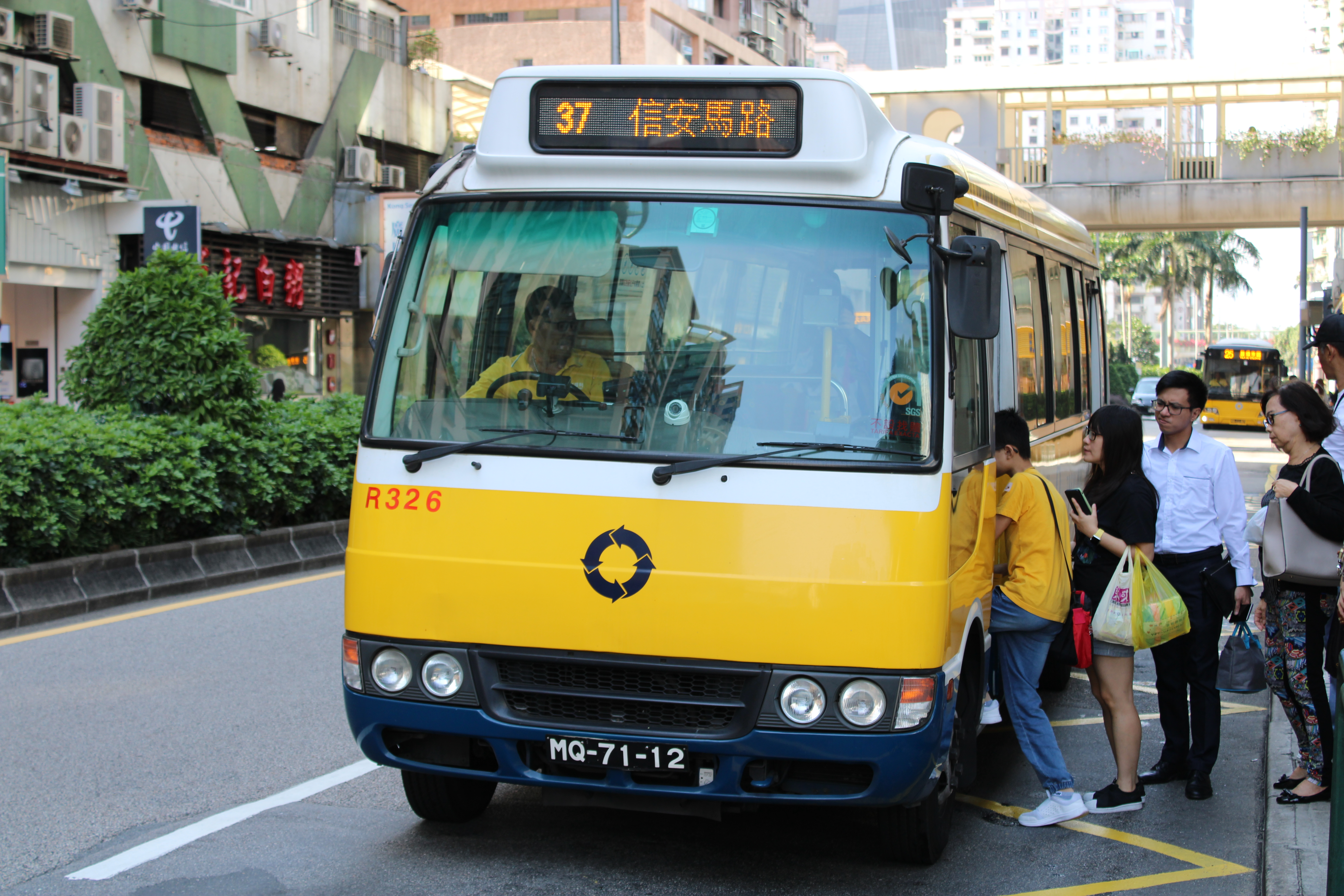 新福利三菱Rosa小巴行駛37路線。